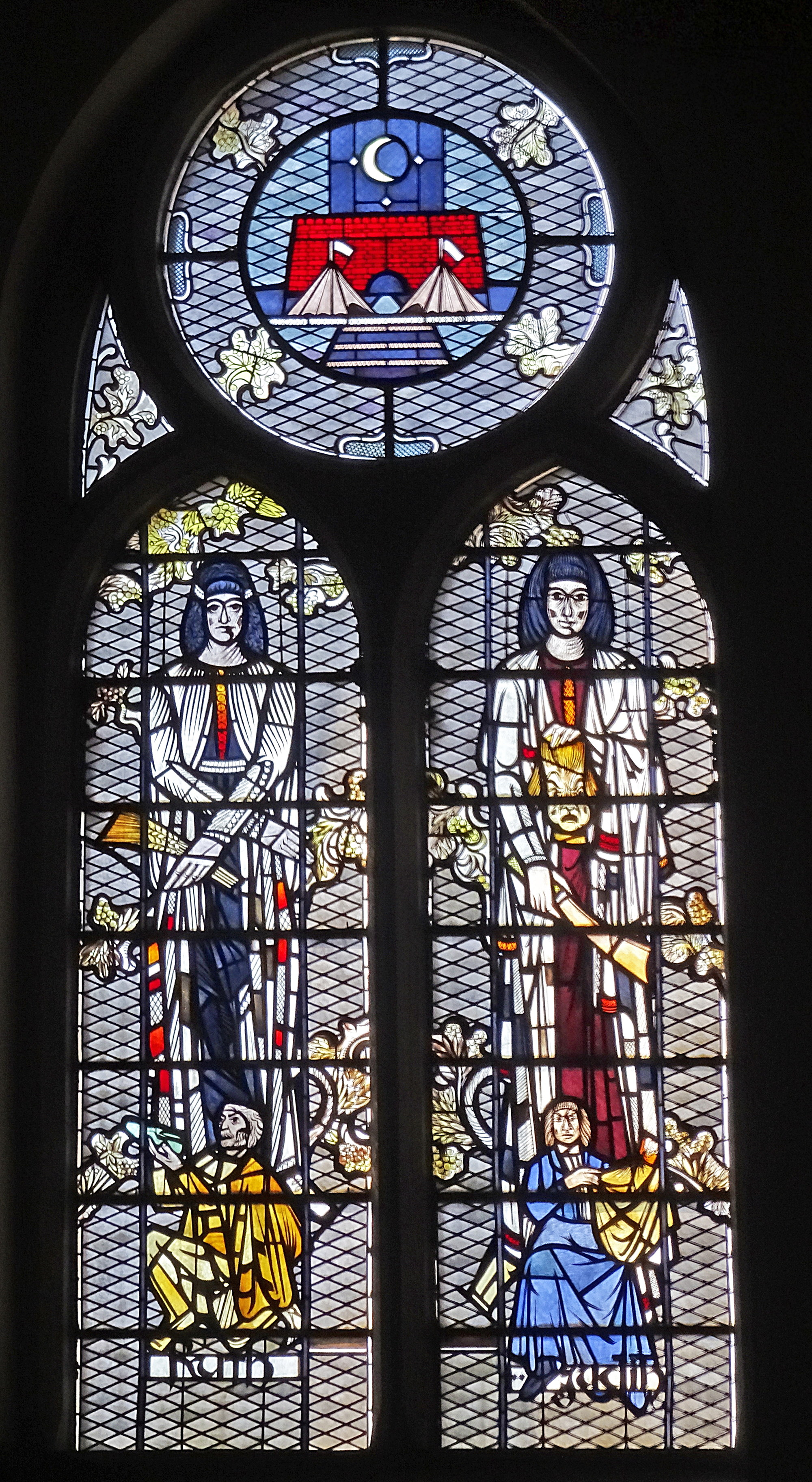 Westfenster I von Karl Völker in der Thomaskirche zu Erfurt